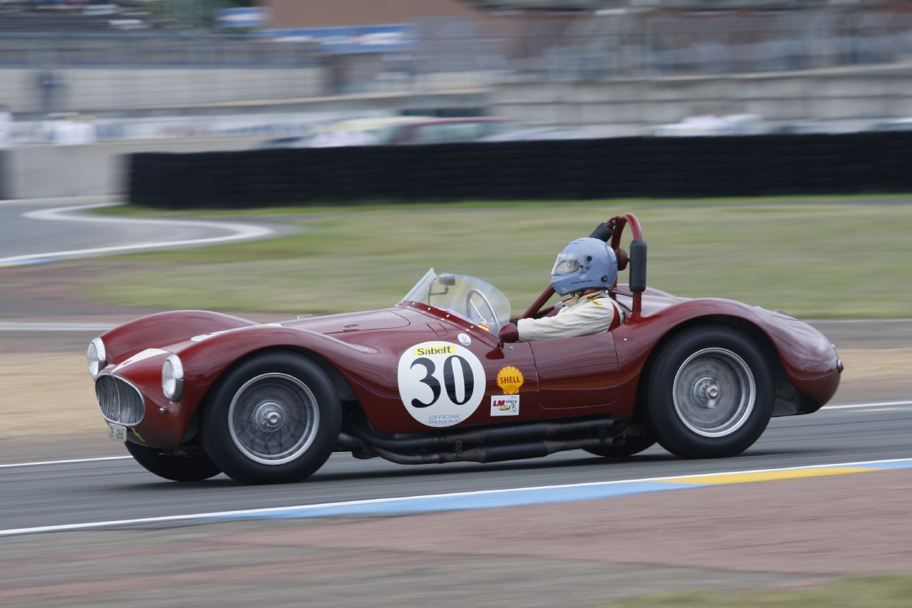 Maserati A6GCS de Lukas HUNI